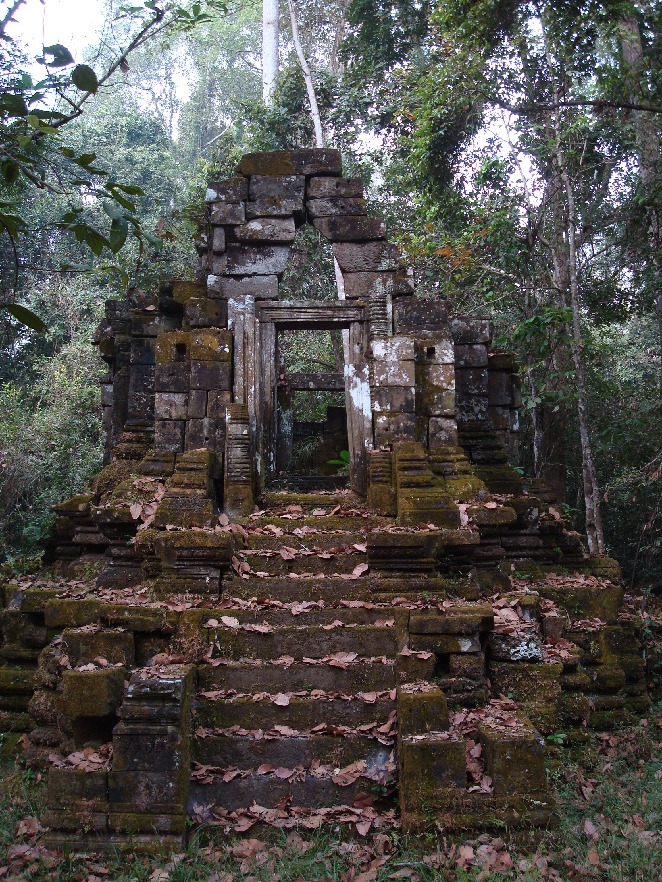 Prasat Mangalartha